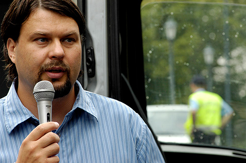 Meggyes Tamás esztergomi polgármester, országgyűlési képviselő egy helyi tüntetésen (Lőrinc utca, Esztergom)